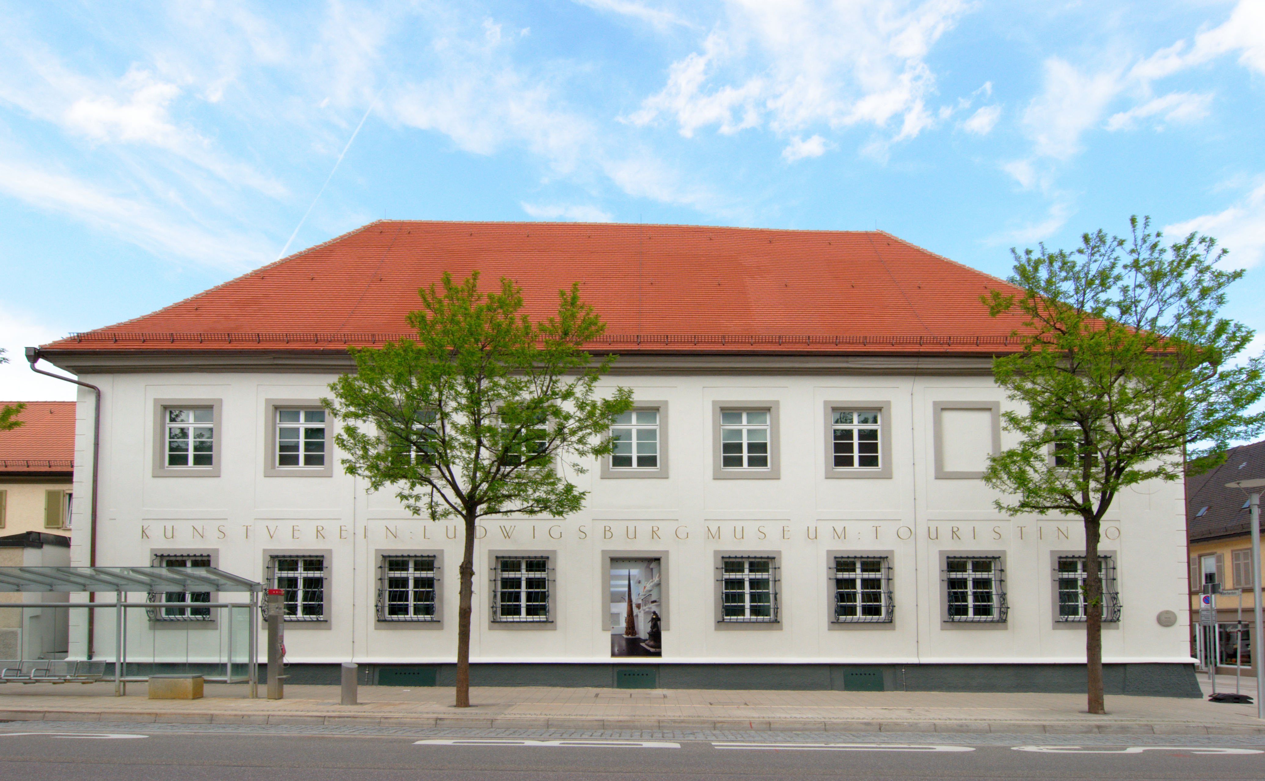 Kultur- und Informationszentrum MIK Museum Information Kunst in Liudwigsburg